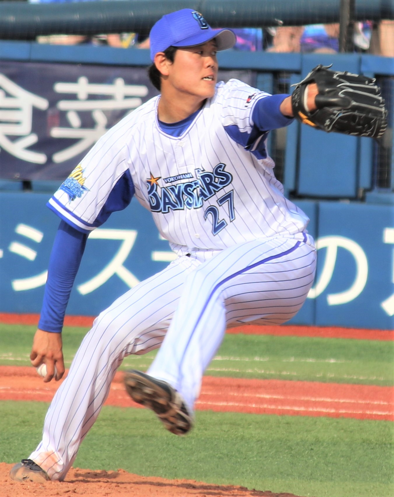 横浜DeNAベイスターズ投手の上茶谷 大河。横浜スタジアムにて。 Canon EOS 7D Mark II